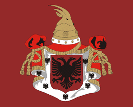 Estendart del pretdent albanès Leka II